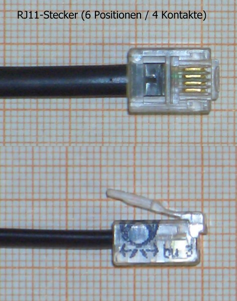 RJ14-Stecker (nicht RJ11!)